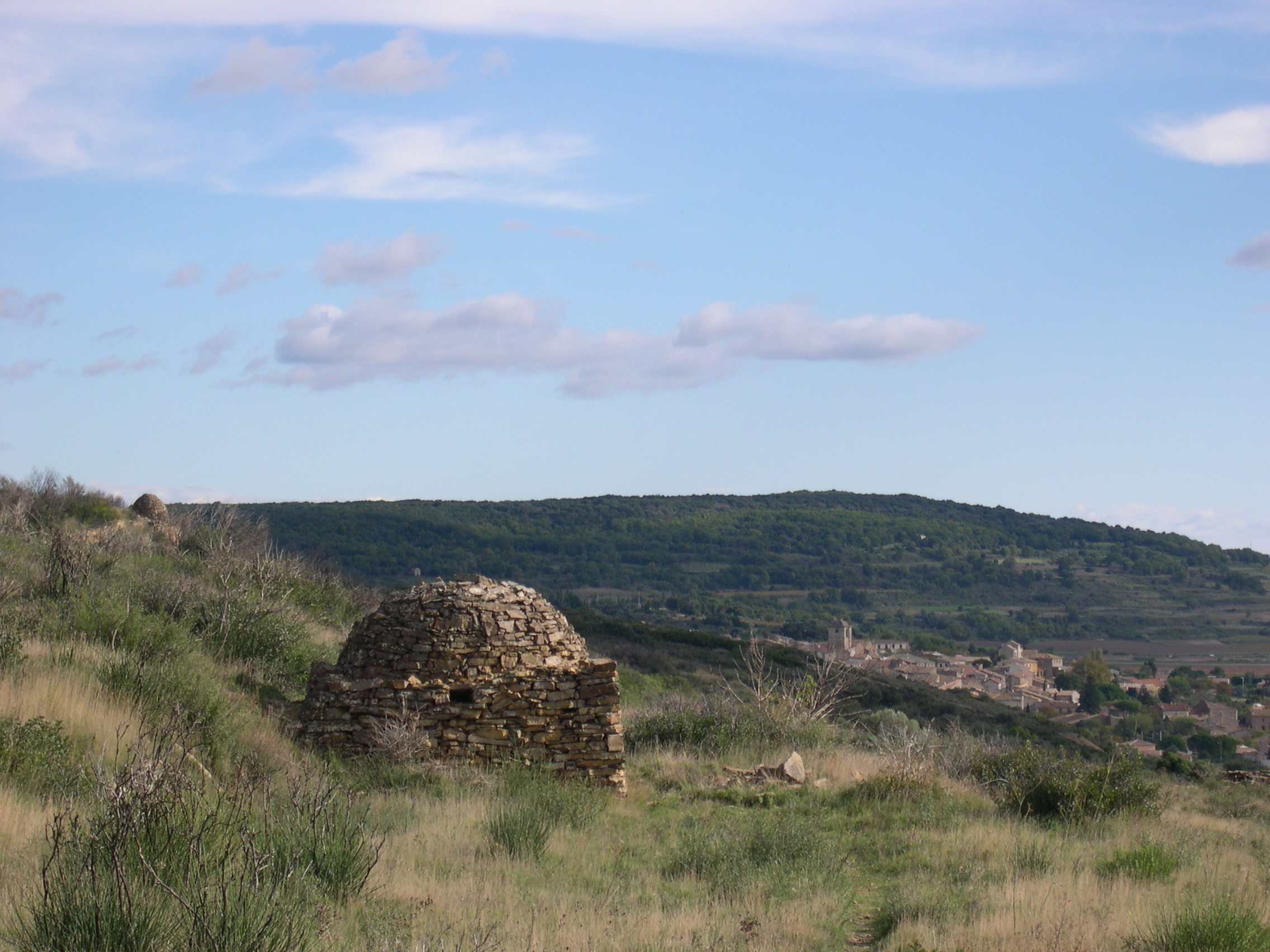 Neffiès (Hérault) - capitelle